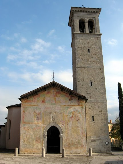 Cividale del Friuli - Chiesa S.Biagio - Esterno prima del restauro